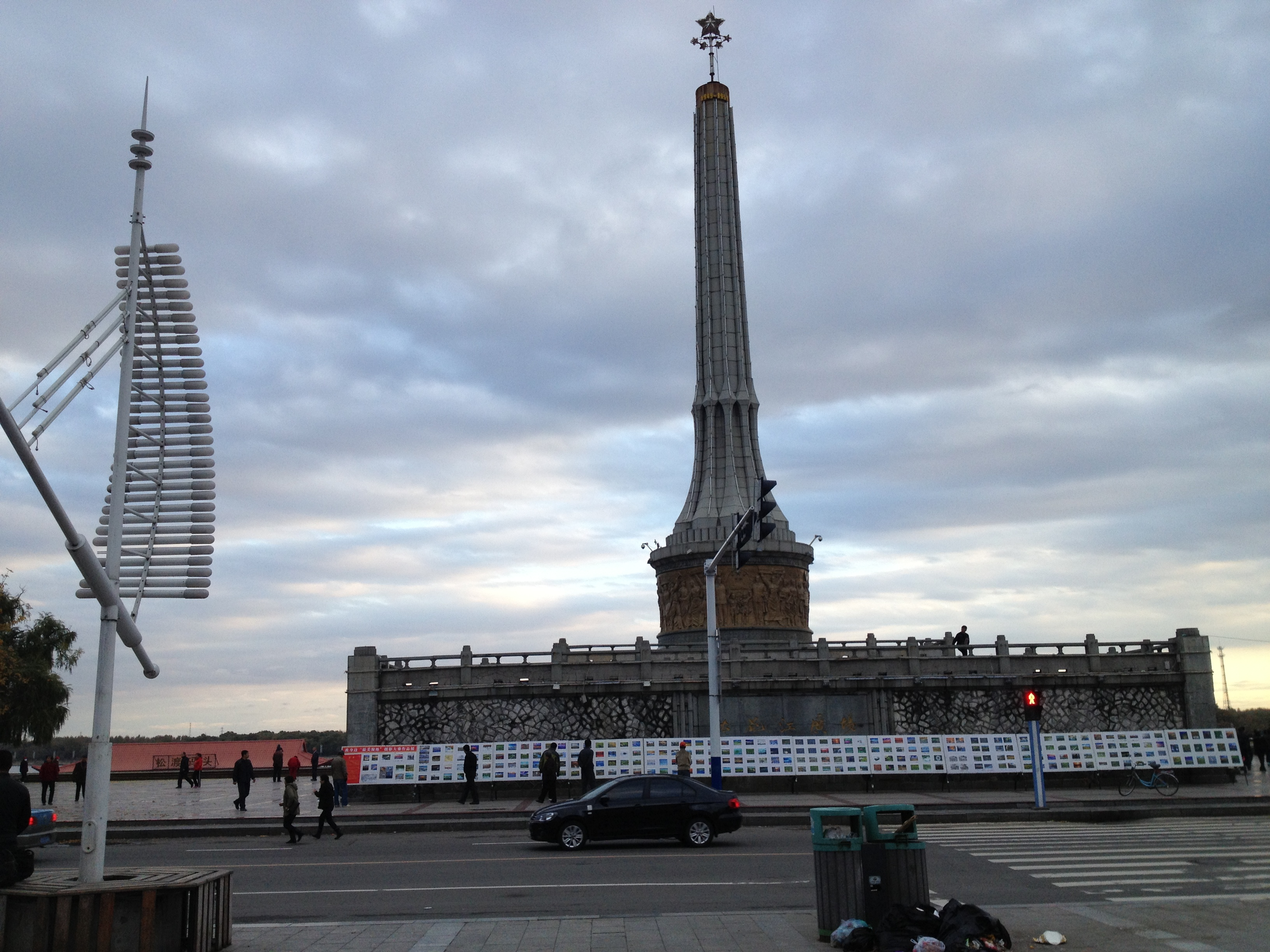 江边大塔